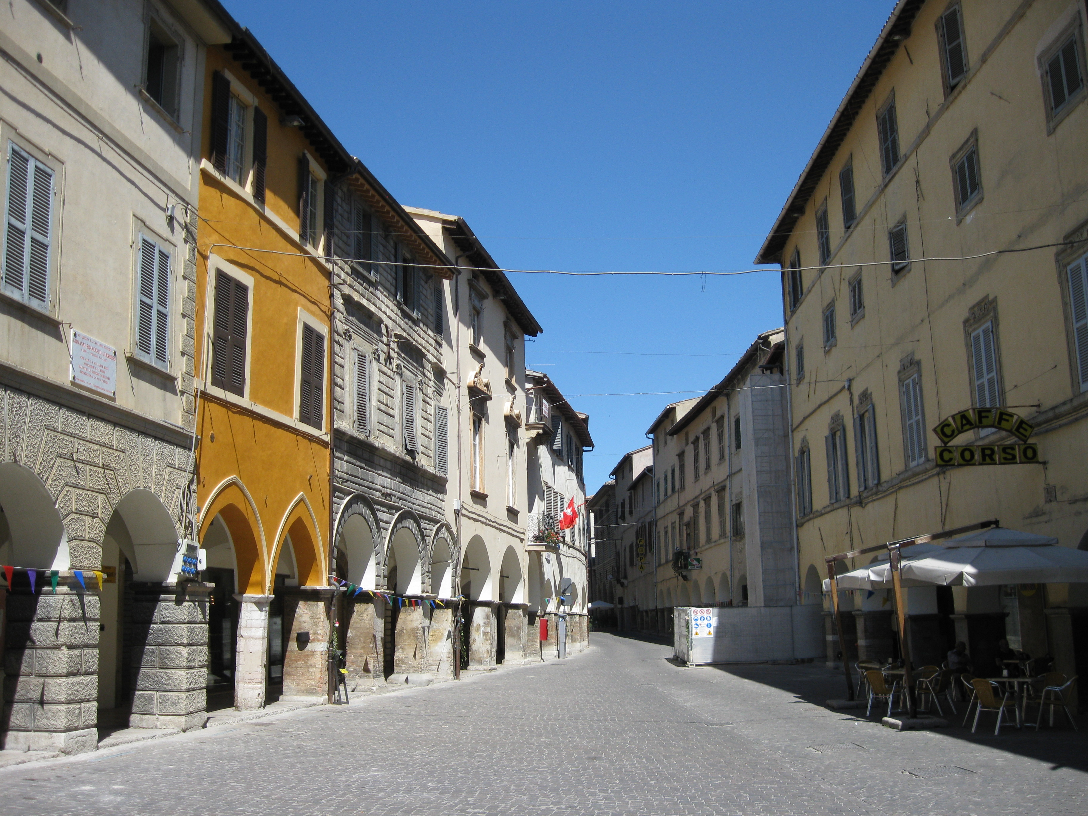 Corso Garibaldi, Fossombrone, Italien